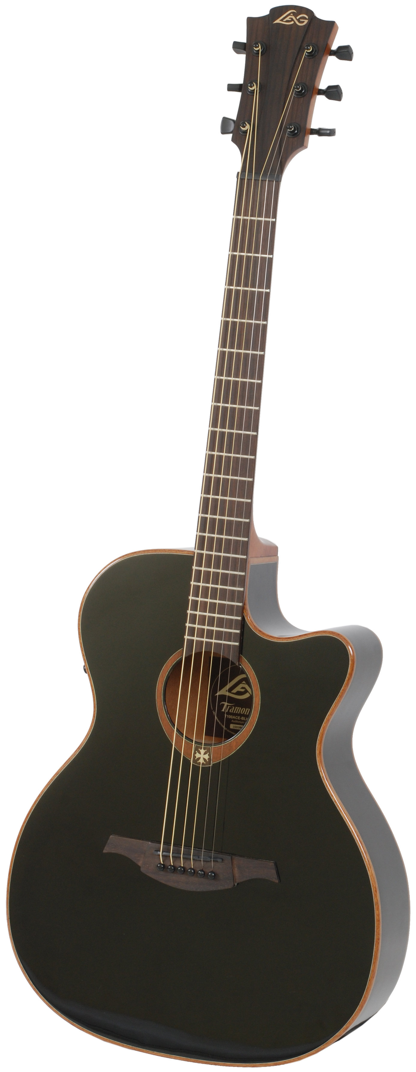 Gitara elektro-akustyczna GLA-T100 ACE Tramontane firmy Lag